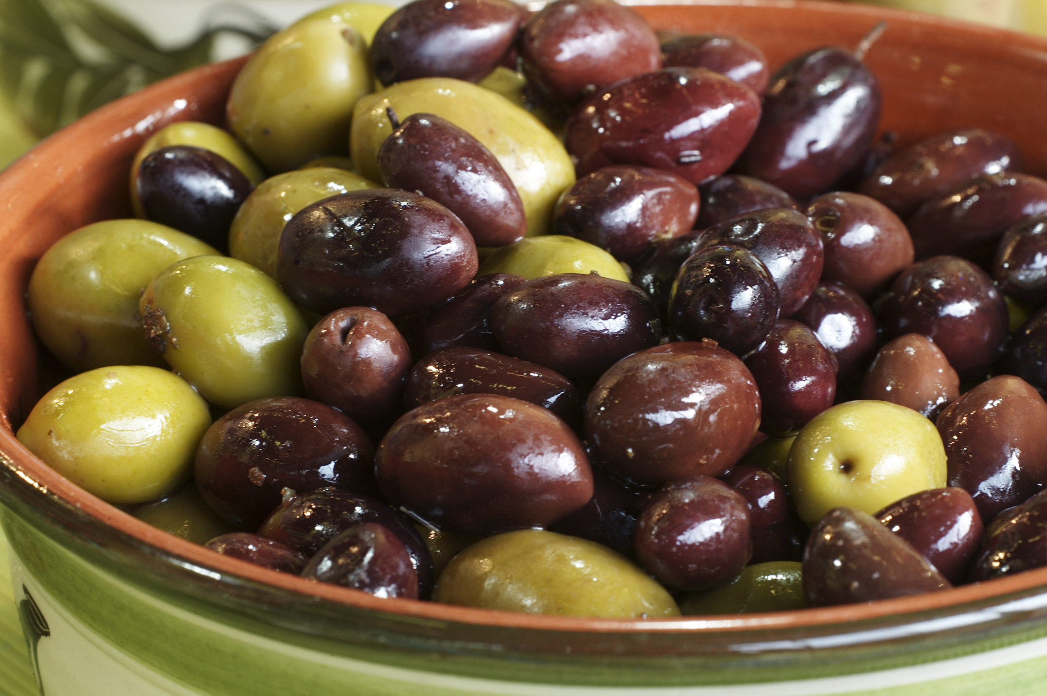 INRA, Jean Weber